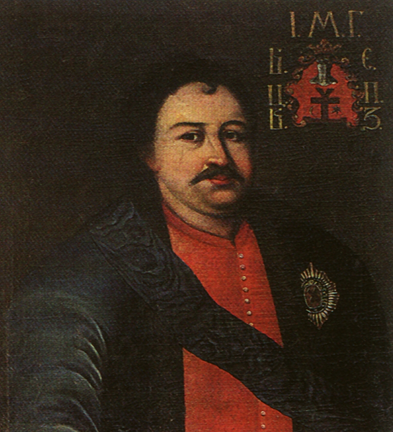 Портрет Івана Мазепи